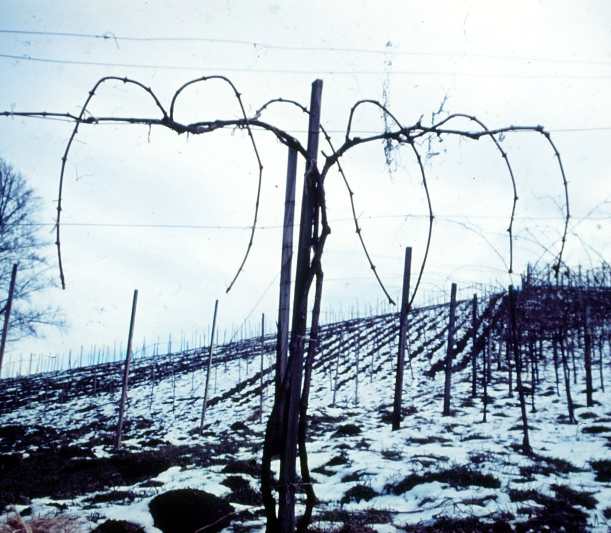 Steirische Bogenerziehung